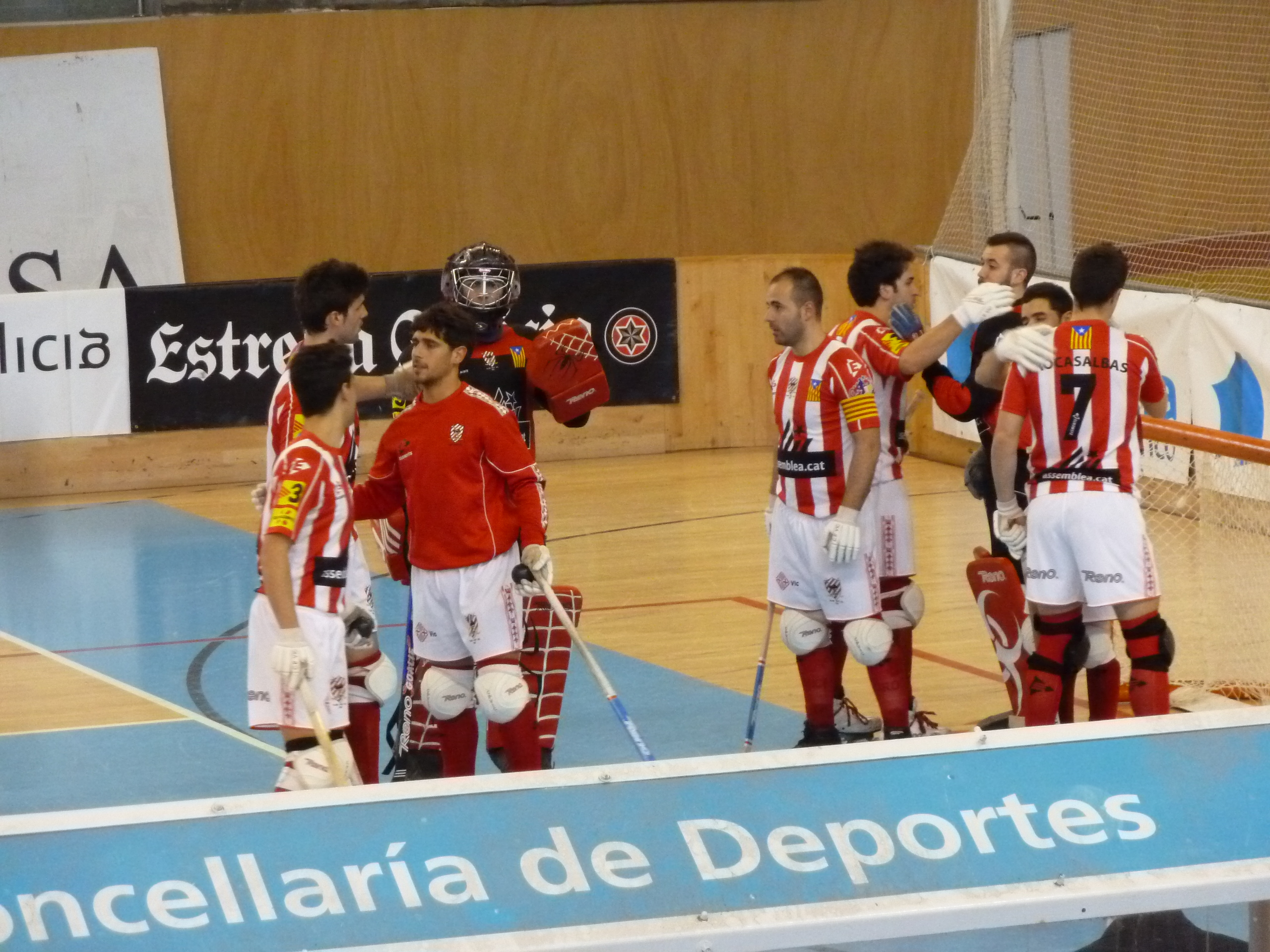 Quecemento do CP Vic no partido de hóckey entre o HC Liceo e o CP Vic en partido da OK liga no Pazo dos deportes de Riazor na Coruña.